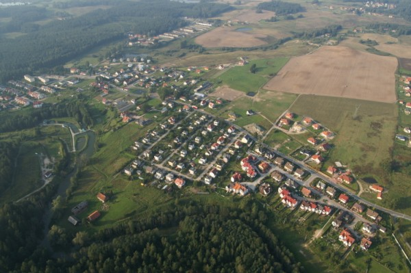 Kieźliny